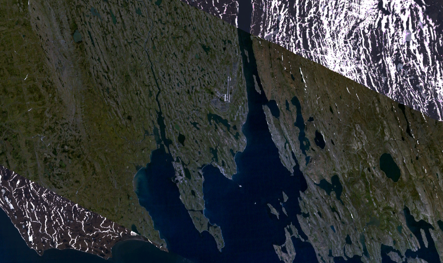 Посёлок Белушья Губа и посёлок Рогачёво с аэропортом Рогачёво (Амдерма 2) на полуострове Гусиная Земля острова Южный архипелага Новая Земля.